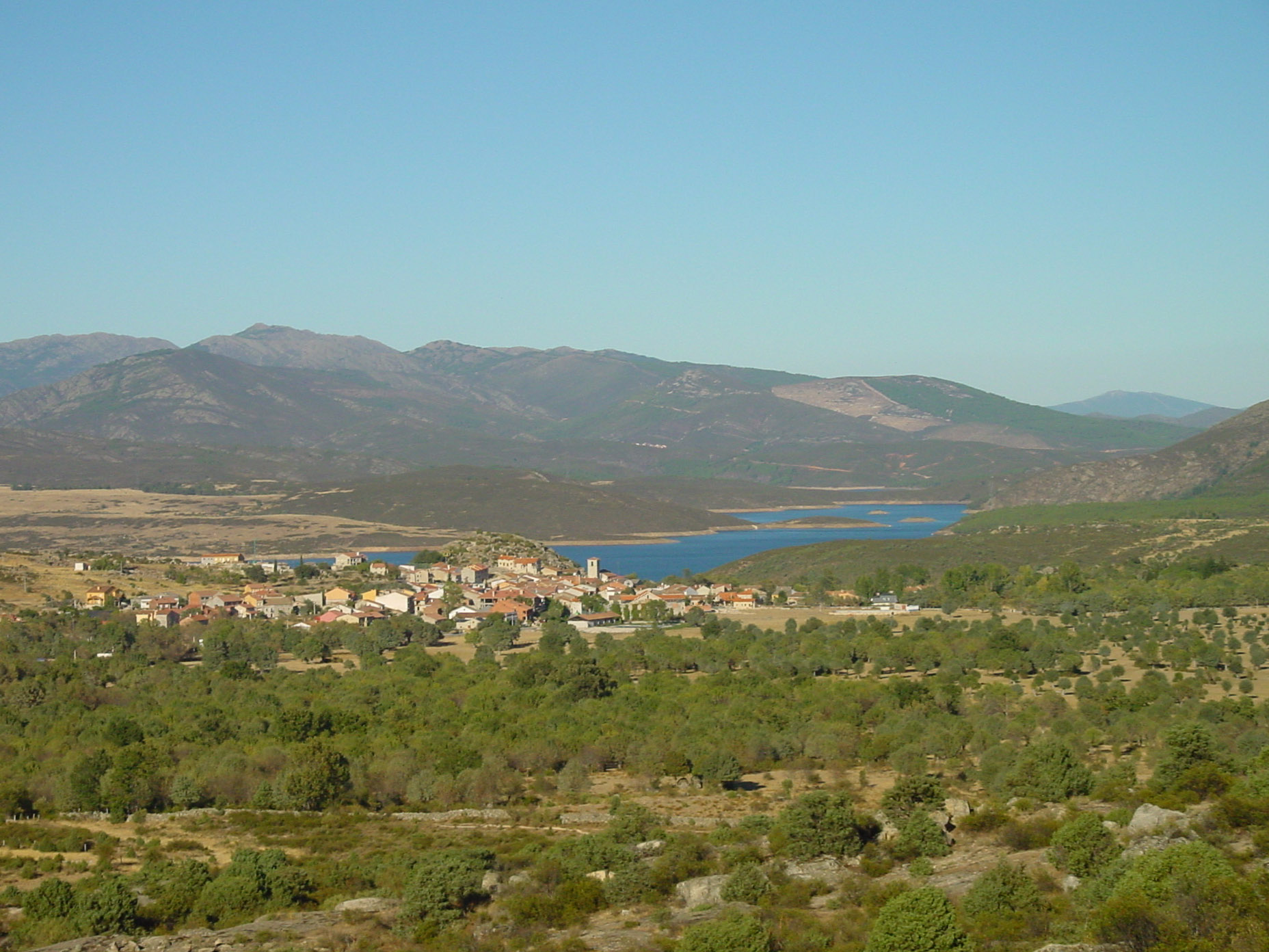 Vista aérea de El Berrueco.